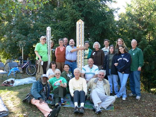 Mi fotis ĝin kaj mi malpretendas ajnan kopirajton, cedante ĝin al la tuta homaro kaj precipe al la ĝemelurboj de Seatlo. --Haruo 09:14, 14. Okt 2006 (UTC) (Licenco estas evidente PD laŭ noto. -- Yekrats 16:21, 1. Mar 2010 (UTC)) Ros' Haruo: "Kompreneble mi rajtigas Creative Commons uzi tiun foton, kaj jes, mi mem fotis ĝin."